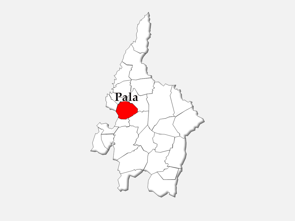 Censos 1864/2011